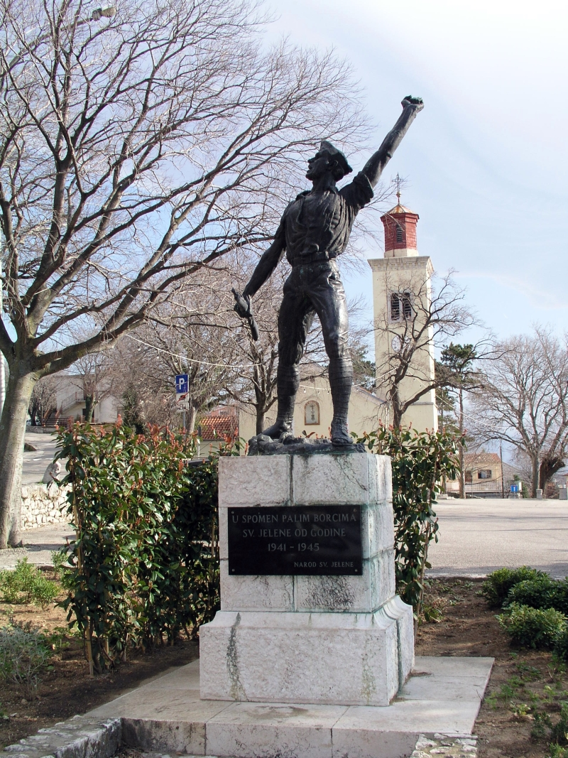 spomenik Zvonka Cara palim borcima Svete Jelene u Drugom svjetskom ratu u Dramlju, Hrvatska